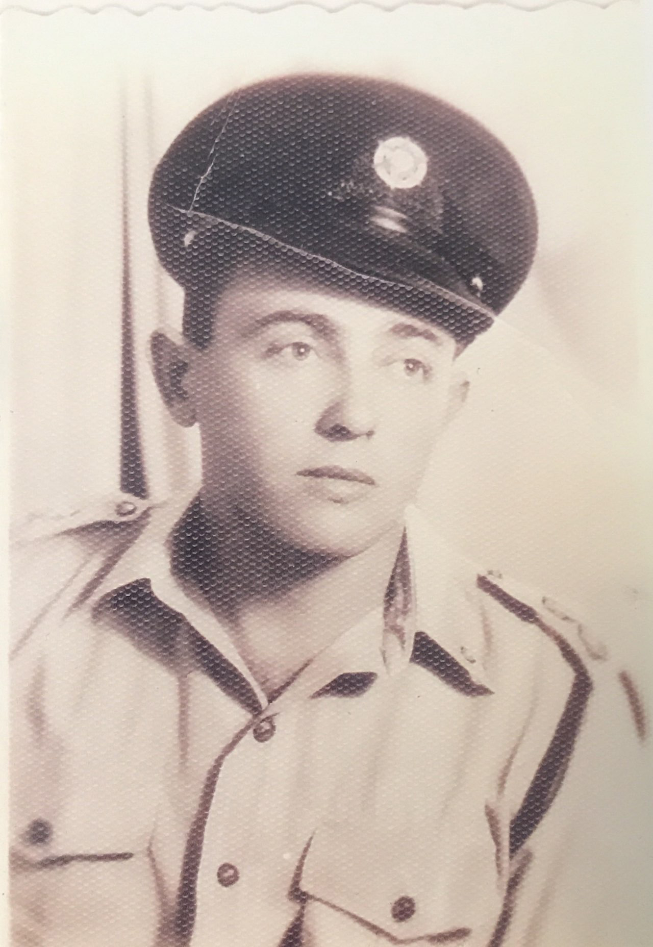 שמואל בוגלר בימיו במשטרה